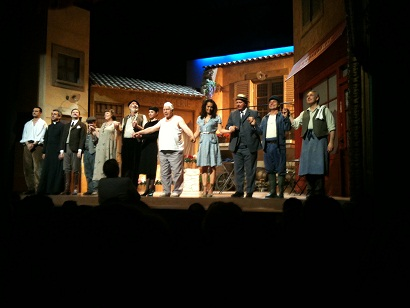 La femme du boulanger 2012 avec Michel Galabru, au théâtre Hébertot de Paris.